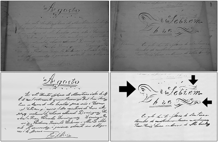 Libro bautismal de la Catedral de Montería que conserva una descripción del evento de 1859 e incluye algunas imágenes de las auroras pintadas a mano.